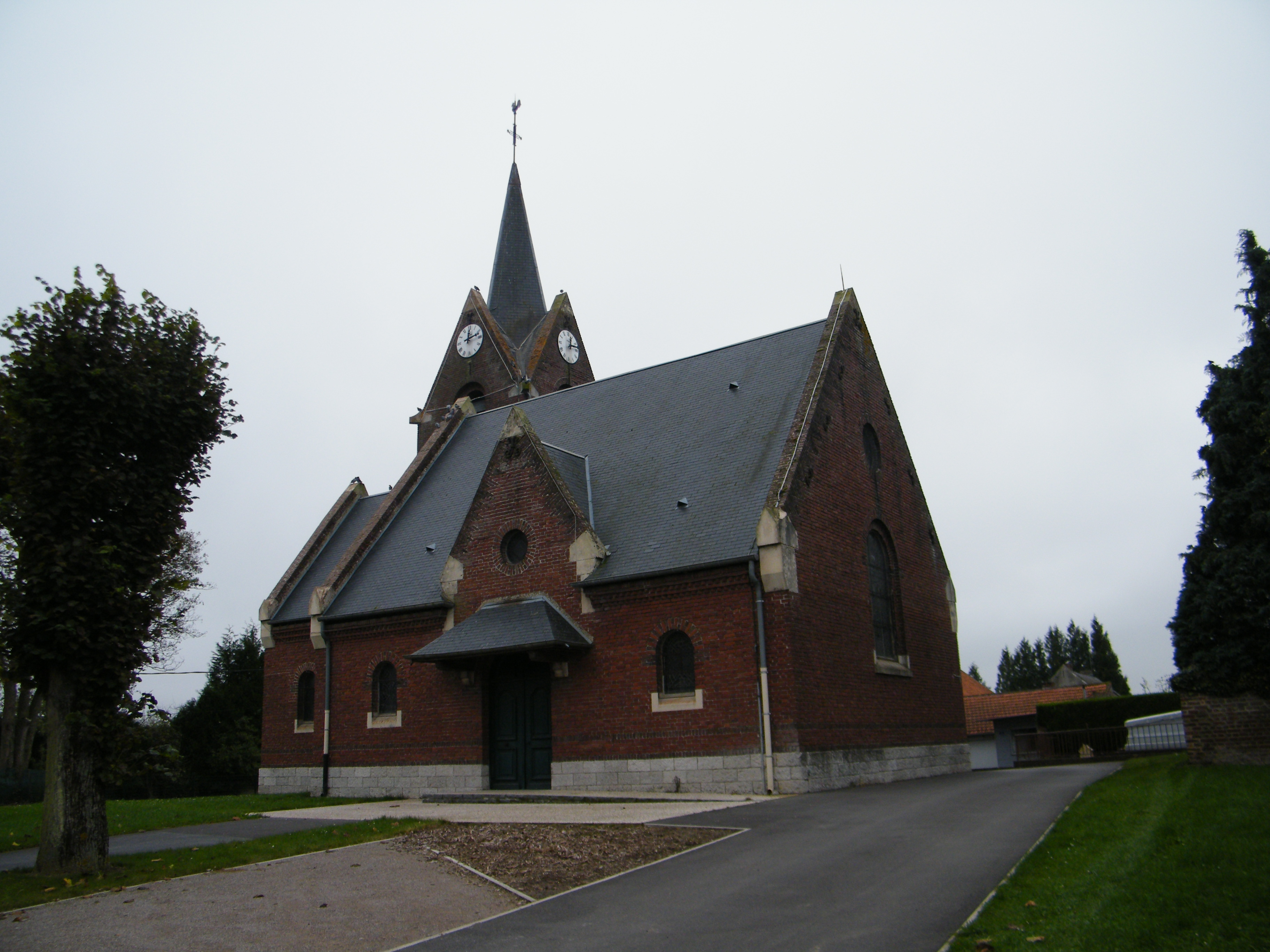 église.